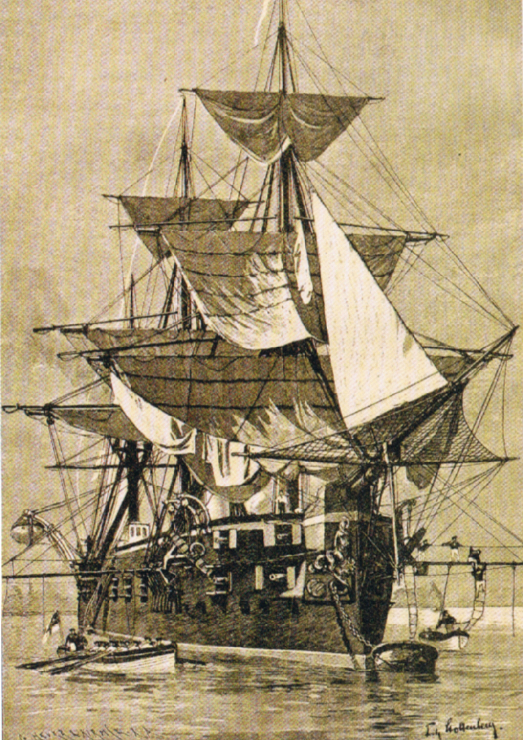 Die Kreuzerfregatte Leipzig, Holzstich und Zeitschiftenillustration von Fritz Stoltenberg